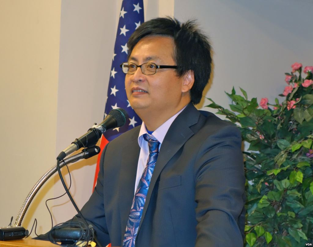 2014年6月1日，天安門民主大學復校籌備組成員封從德出席天安門民主大學開學典禮。